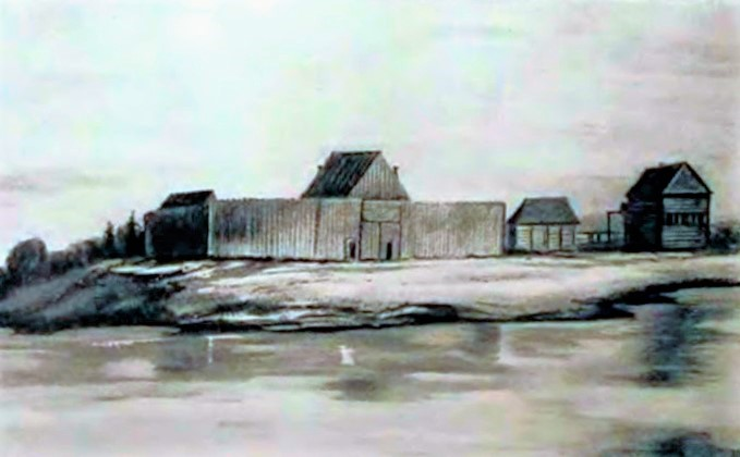 Il carcere di Viljujsk, dove Nikolaj Černyševskij visse in esilio per quasi dodici anni